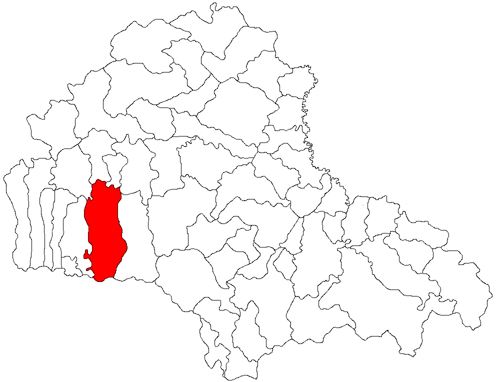 Categorie:Hărţi ale judeţului Braşov